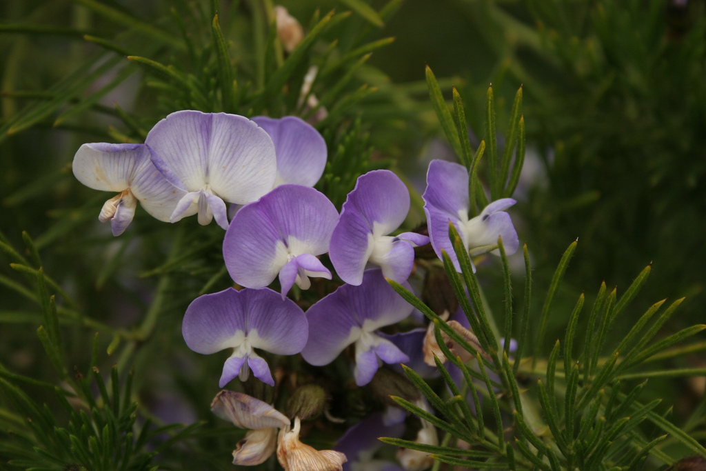 Psoralea pinnata (Original: 157534675_f44ceee159_b.jpg)